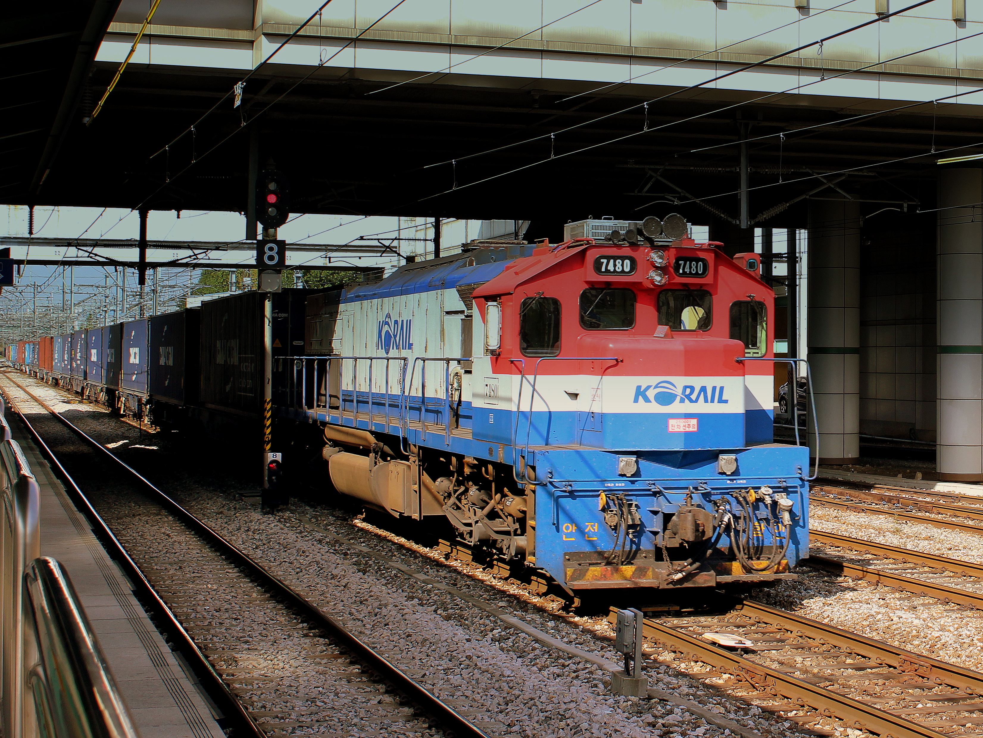 KOREAN RAILWAYS (KO RAIL) FREIGHT TRAIN AT INCHON STATION SEOUL SOUTH KOREA OCT 2012